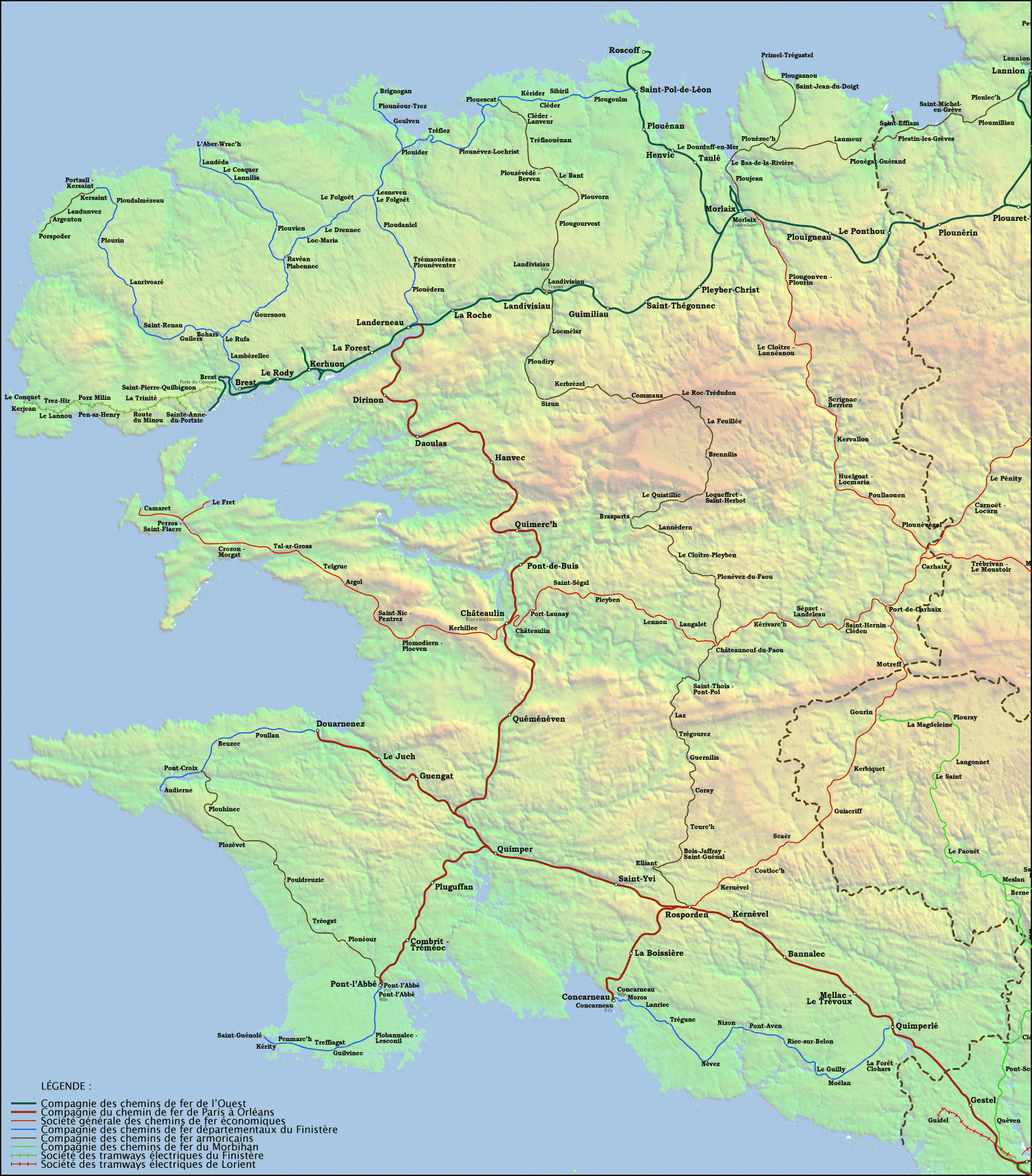 Carte du réseau ferroviaire finistérien à son apogée